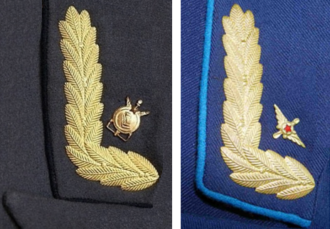 Мундир 1955